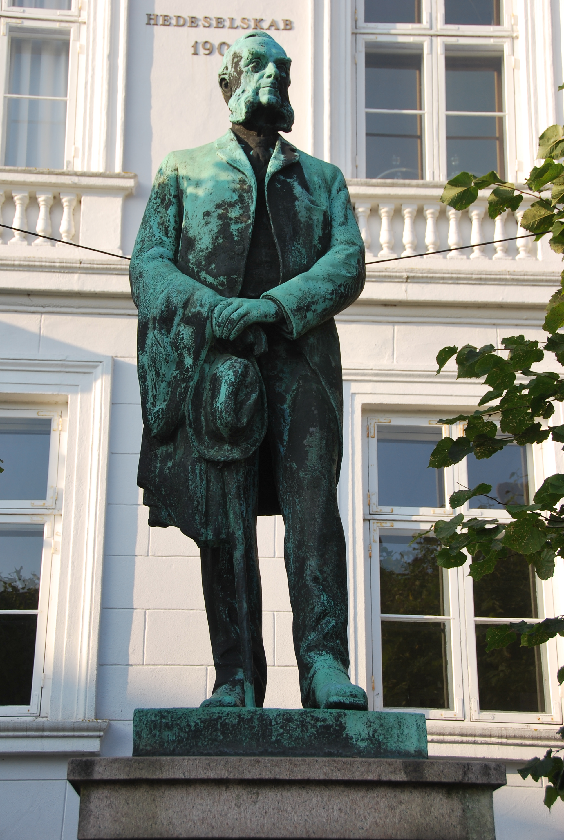 Statue af Christian von Lüttichau (1832-1915), placeret foran Viborg Museum. 1918 af Anders Bundgaard (1864-1927).